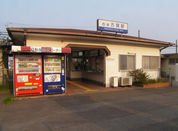 西鉄古賀駅 2007年3月21日、投稿者が撮影。